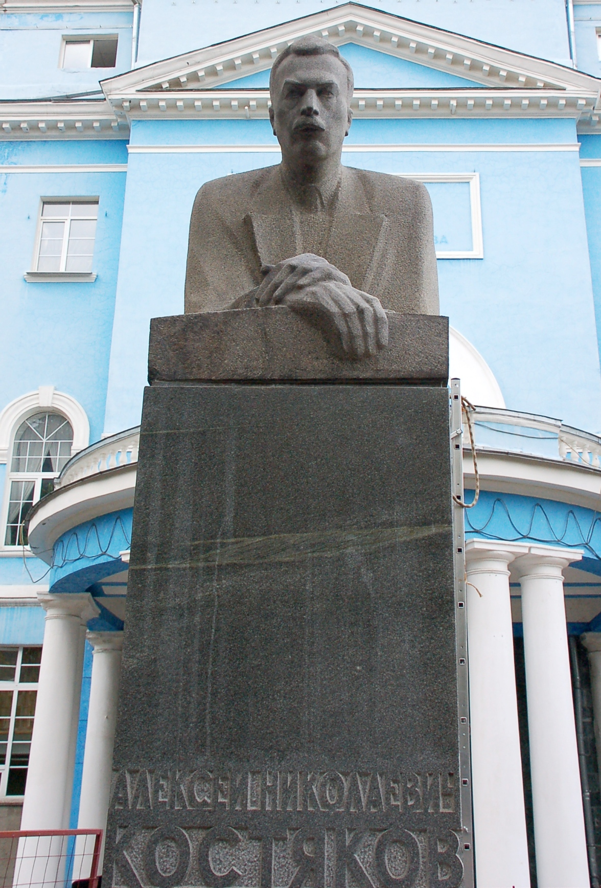 Памятник А.Н. Костякову: Тимирязевский, Северный округ, Москва